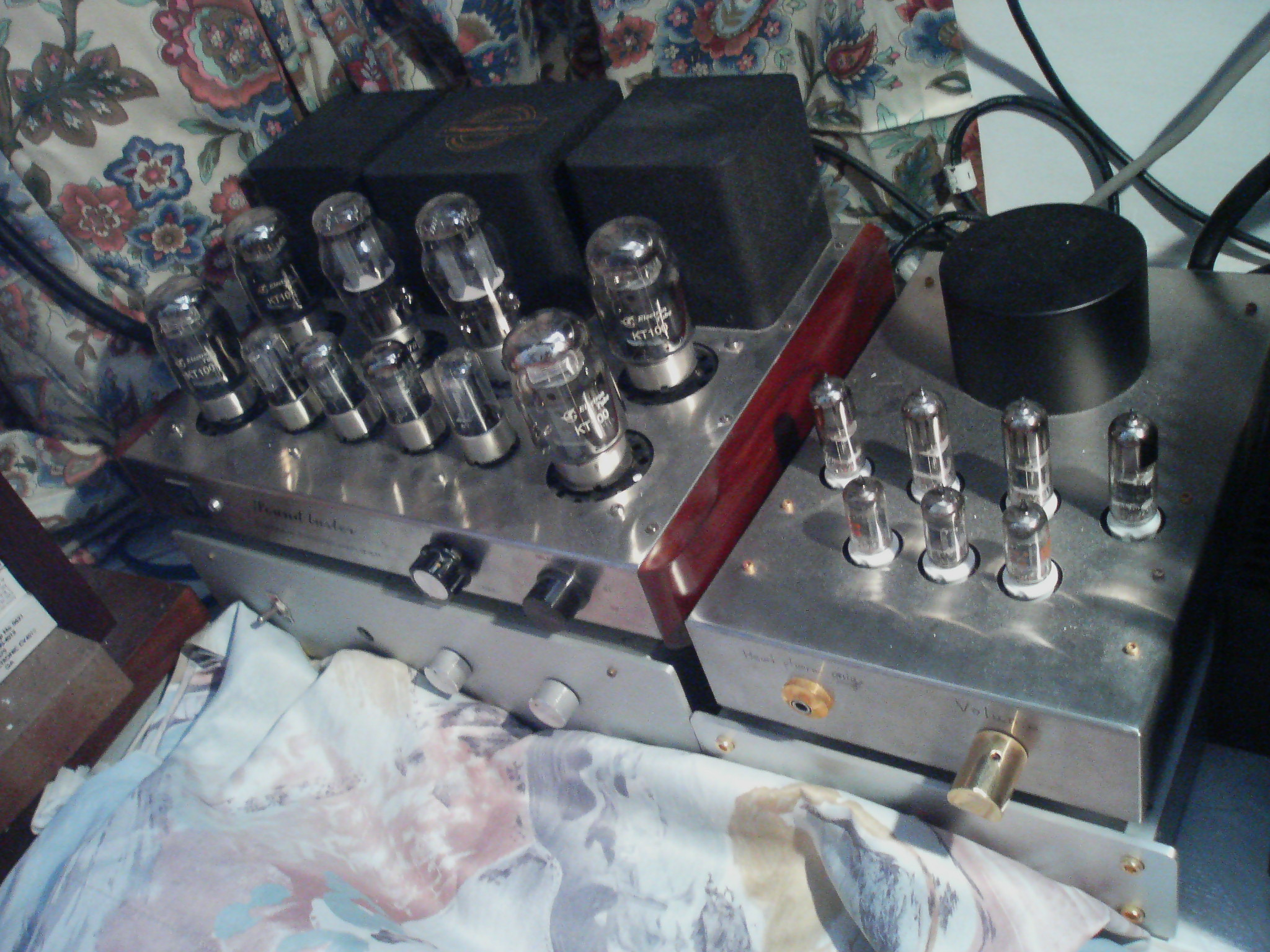 筆者自己焊製的膽機